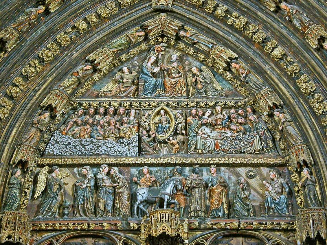 Santa María de los Reyes. Laguardia, Araba, Euskadi